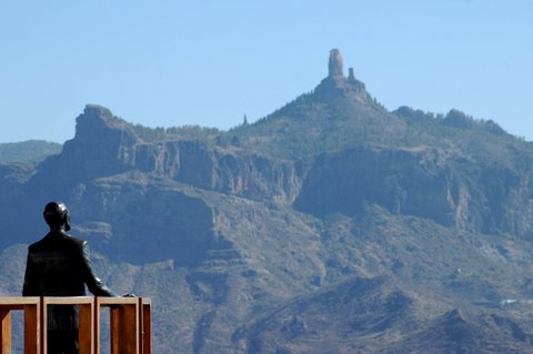 Mirador Balcón de Unamuno, Artenara